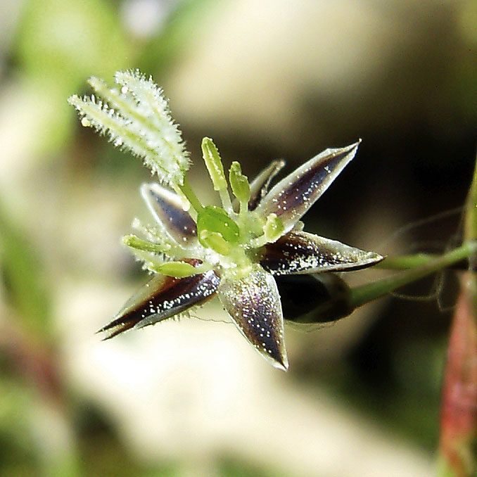 Bluete der Behaarten Hainsimse (Luzula pilosa), flower of Luzula pilosa